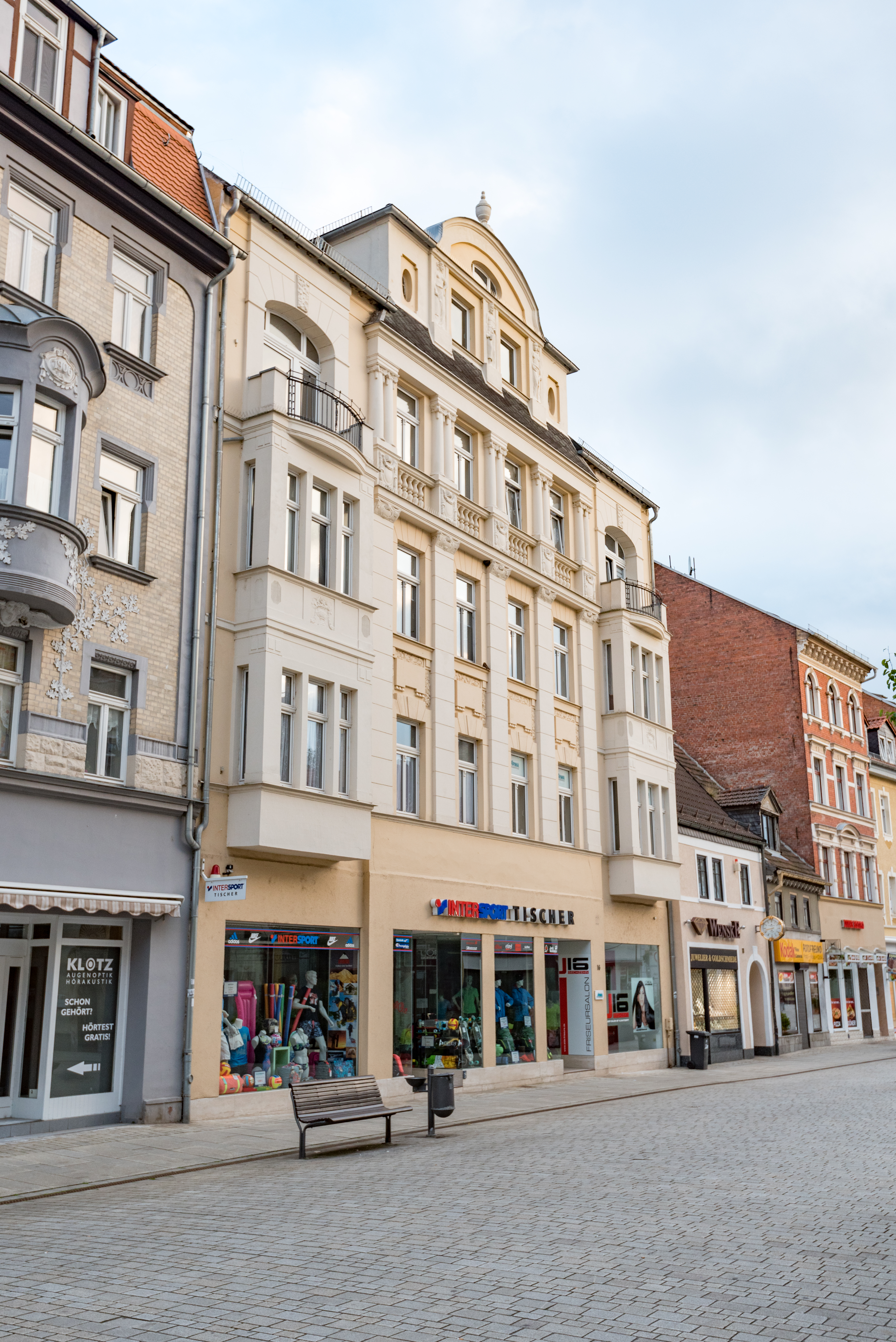 Weißenfels, Jüdenstraße 16